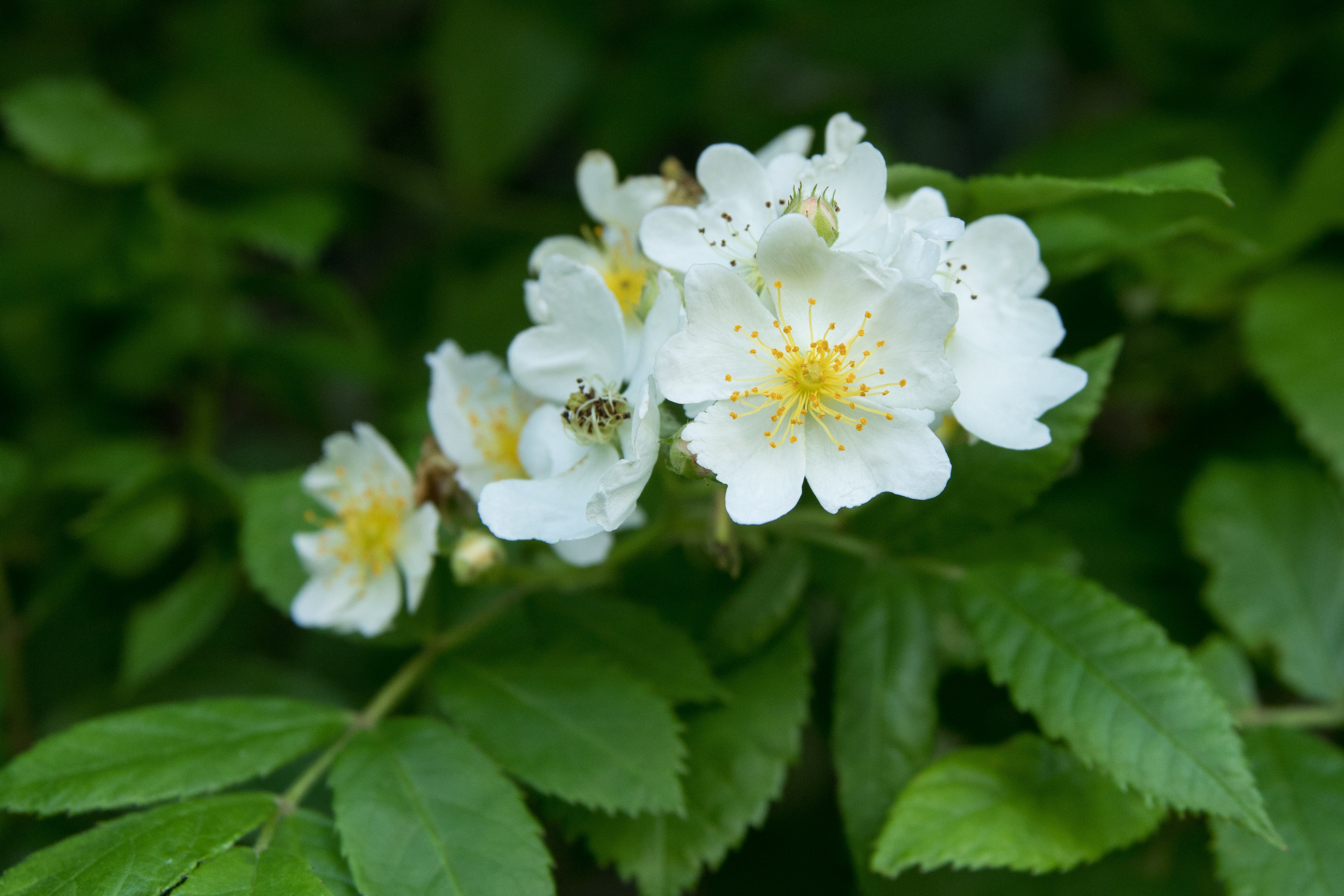 ノイバラ (学名:Rosa multiflora)